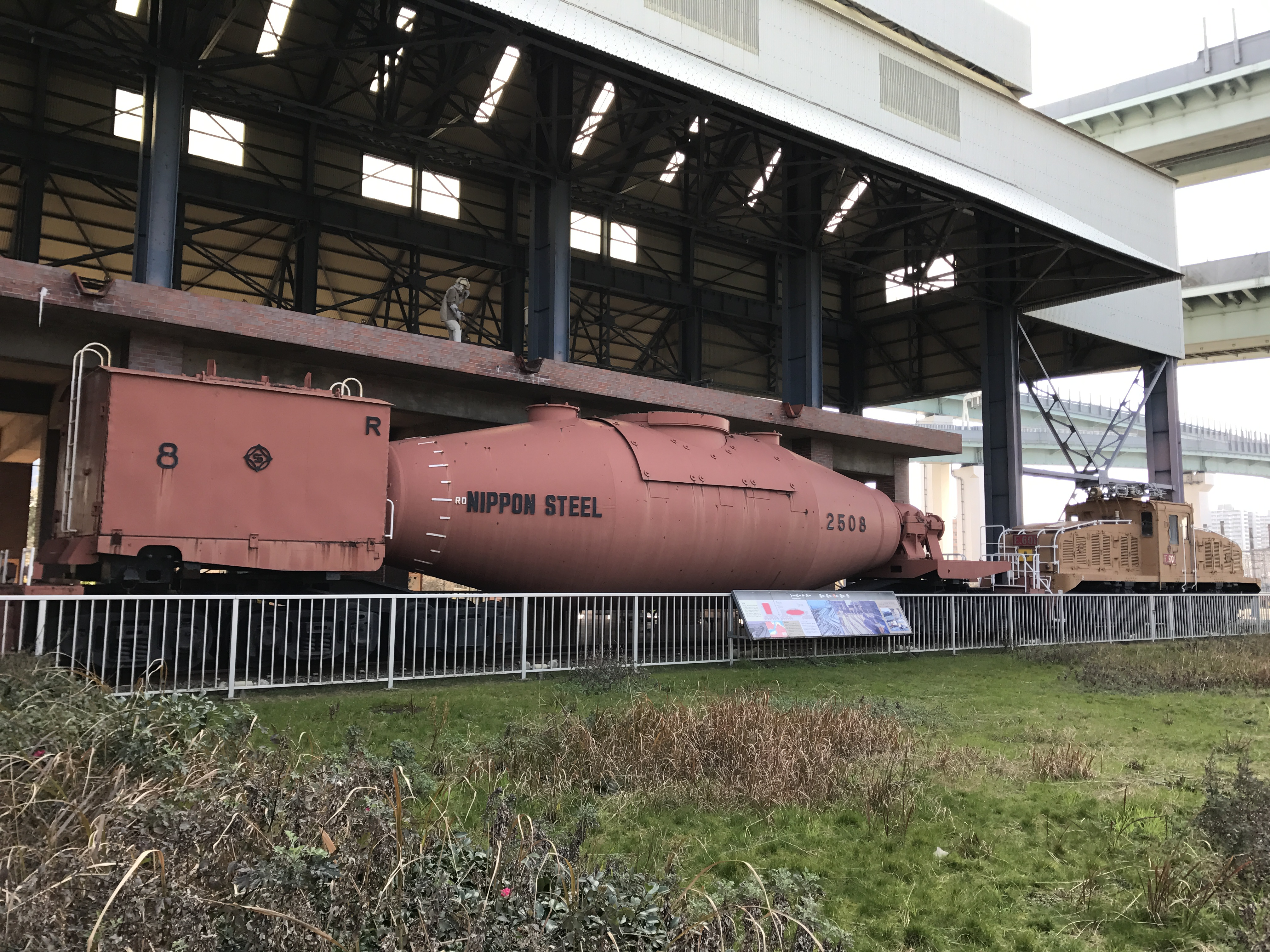 東田高炉史跡広場のトーピードカー